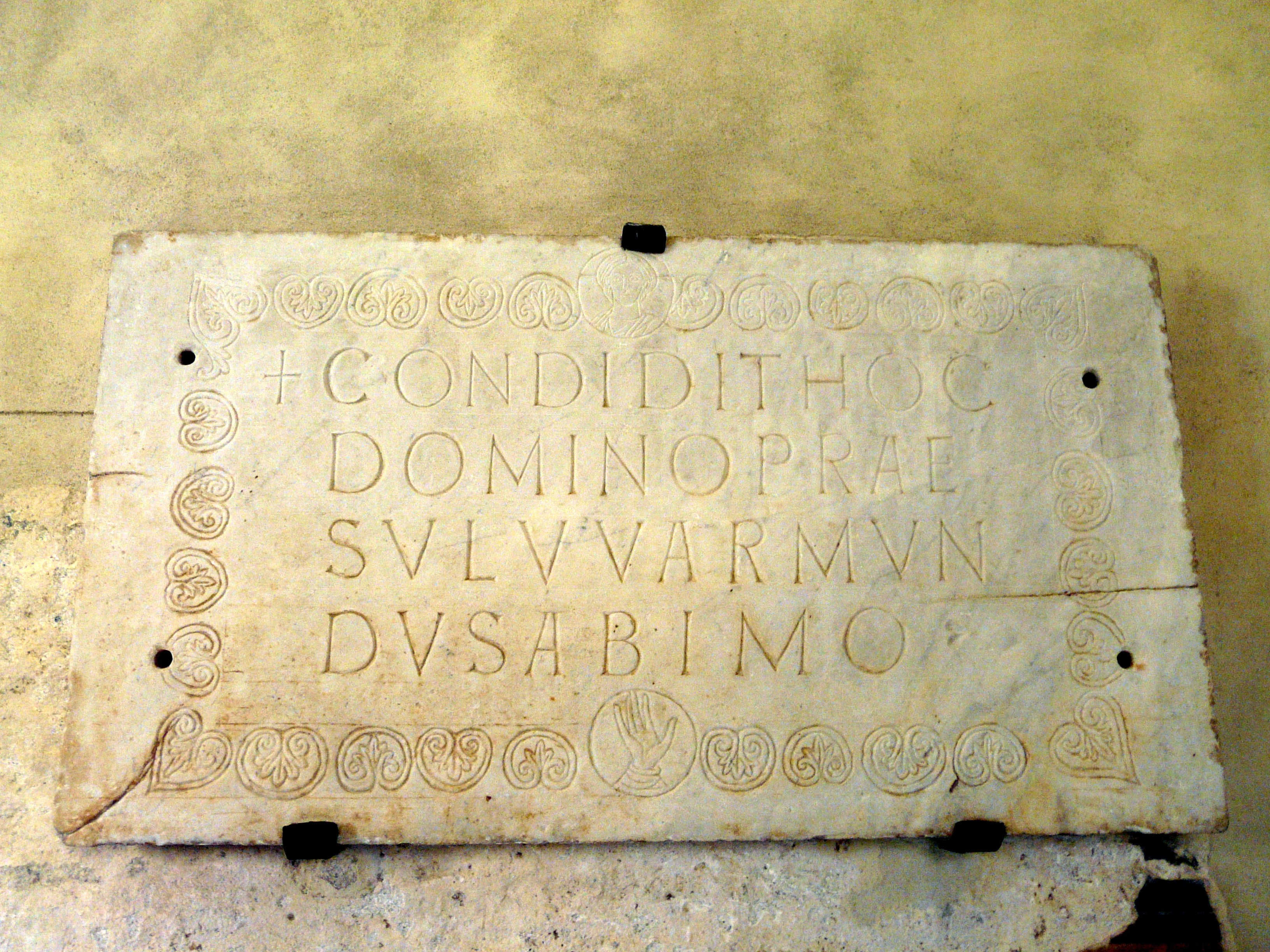 Duomo di Ivrea, Piemonte, Italia